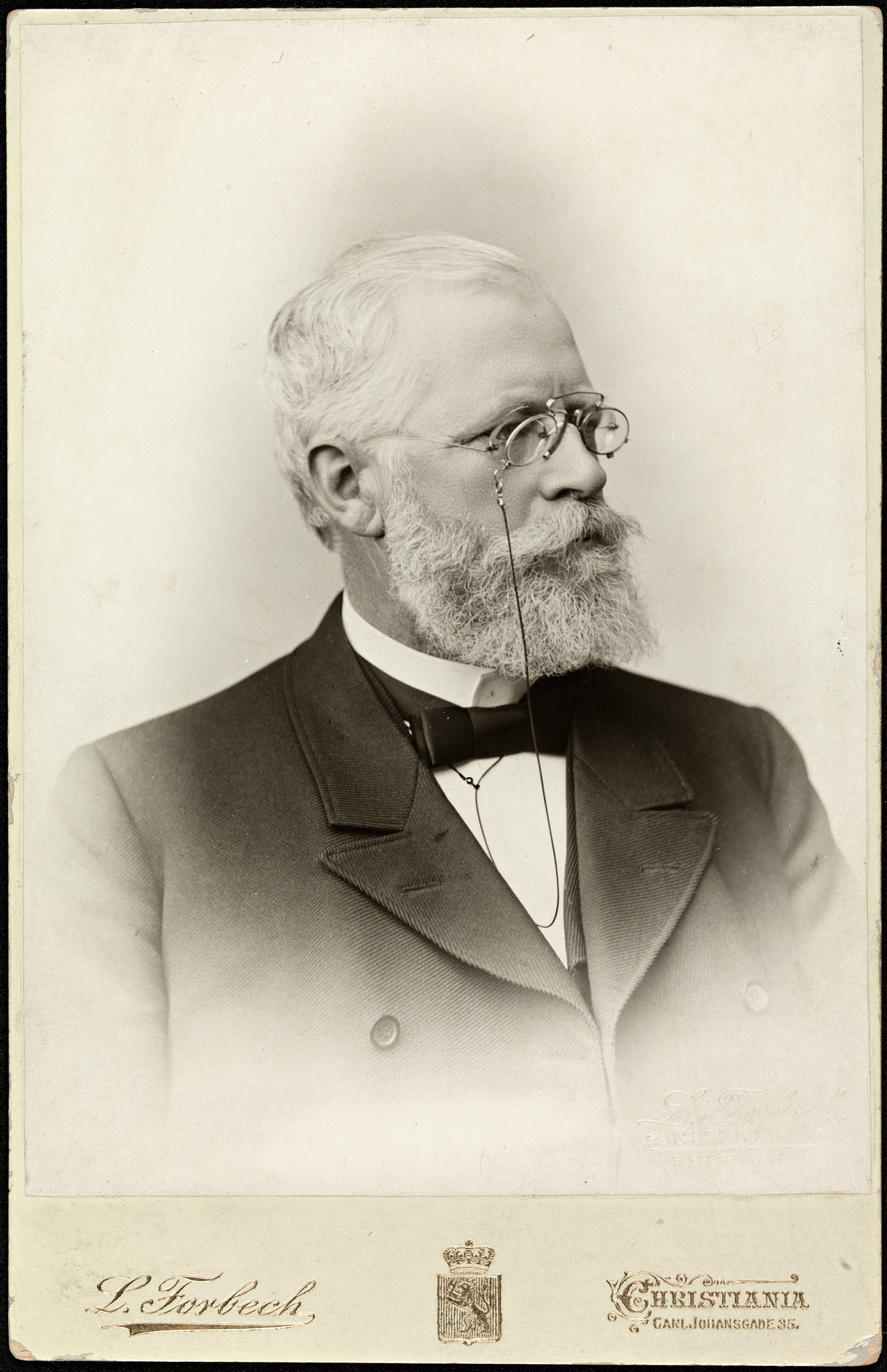 Tittel / Title: Portrett av Axel Charlot Drolsum (1846-1927) Beskrivelse / Description: Kabinettkort. Som sjef for Universitetsbiblioteket i Oslo 1876–1922, ledet Drolsum bibliotekets omdannelse og utbygging til et moderne forskningsbibliotek og planla biblioteksbygningen på Drammensveien, oppført 1911–13 Dato / Date: ca 1905 Fotograf / Photographer: L. Forbech (Christiania) Sted / Place: Oslo Eier / Owner Institution: Nasjonalbiblioteket / National Library of Norway Lenke / Link: Bildesignatur / Image Number: blds_05801